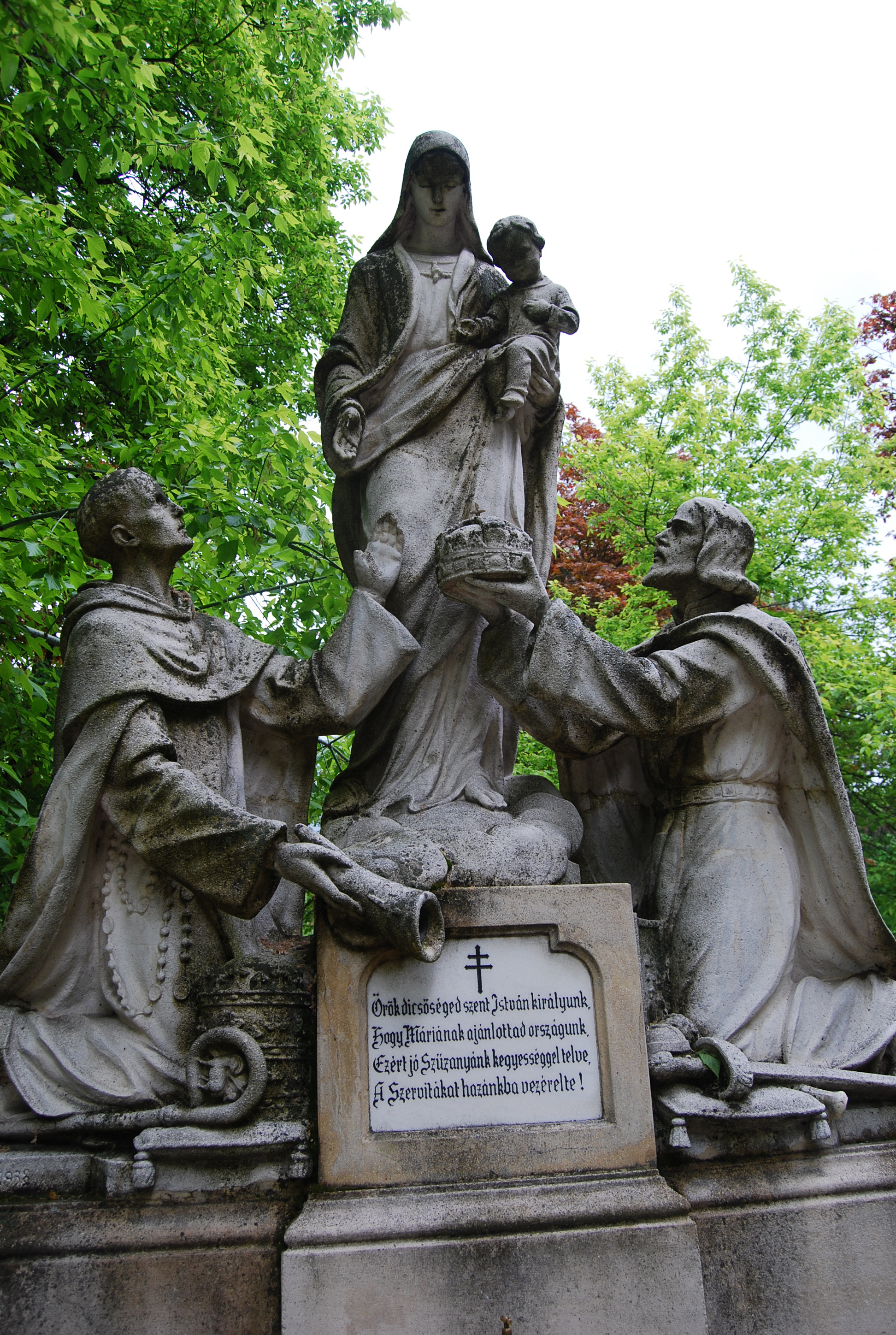 A szentkút a máriaremetei kegytemplom kertjében